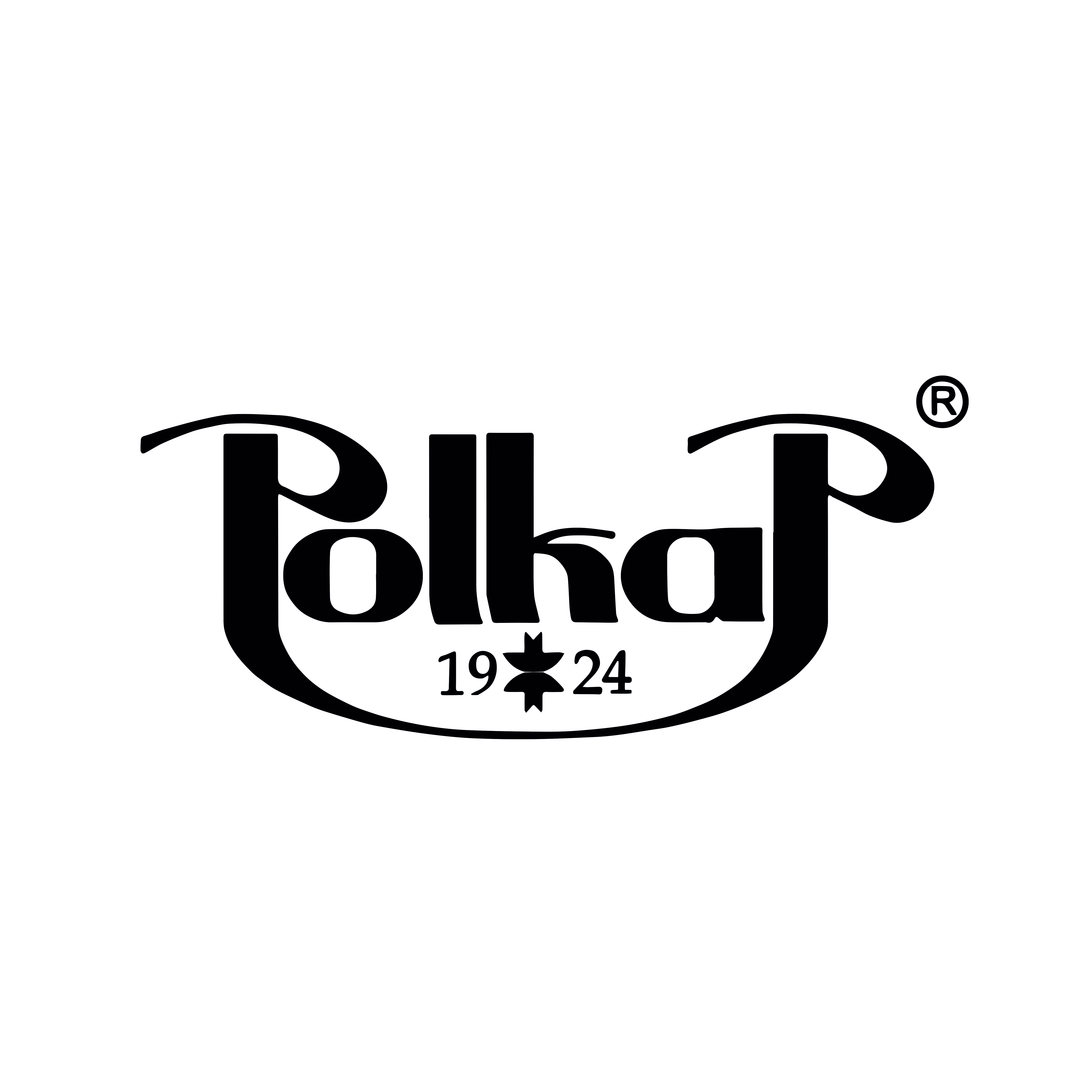 Logo Polkap